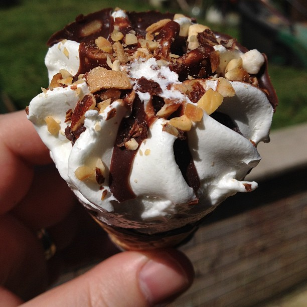 An Algida Cornetto ice cream